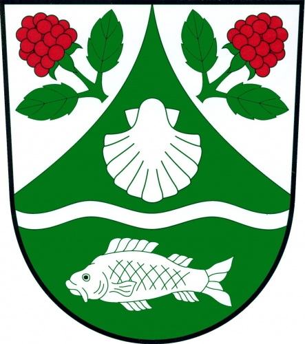 znak, Malenice, okres Strakonice